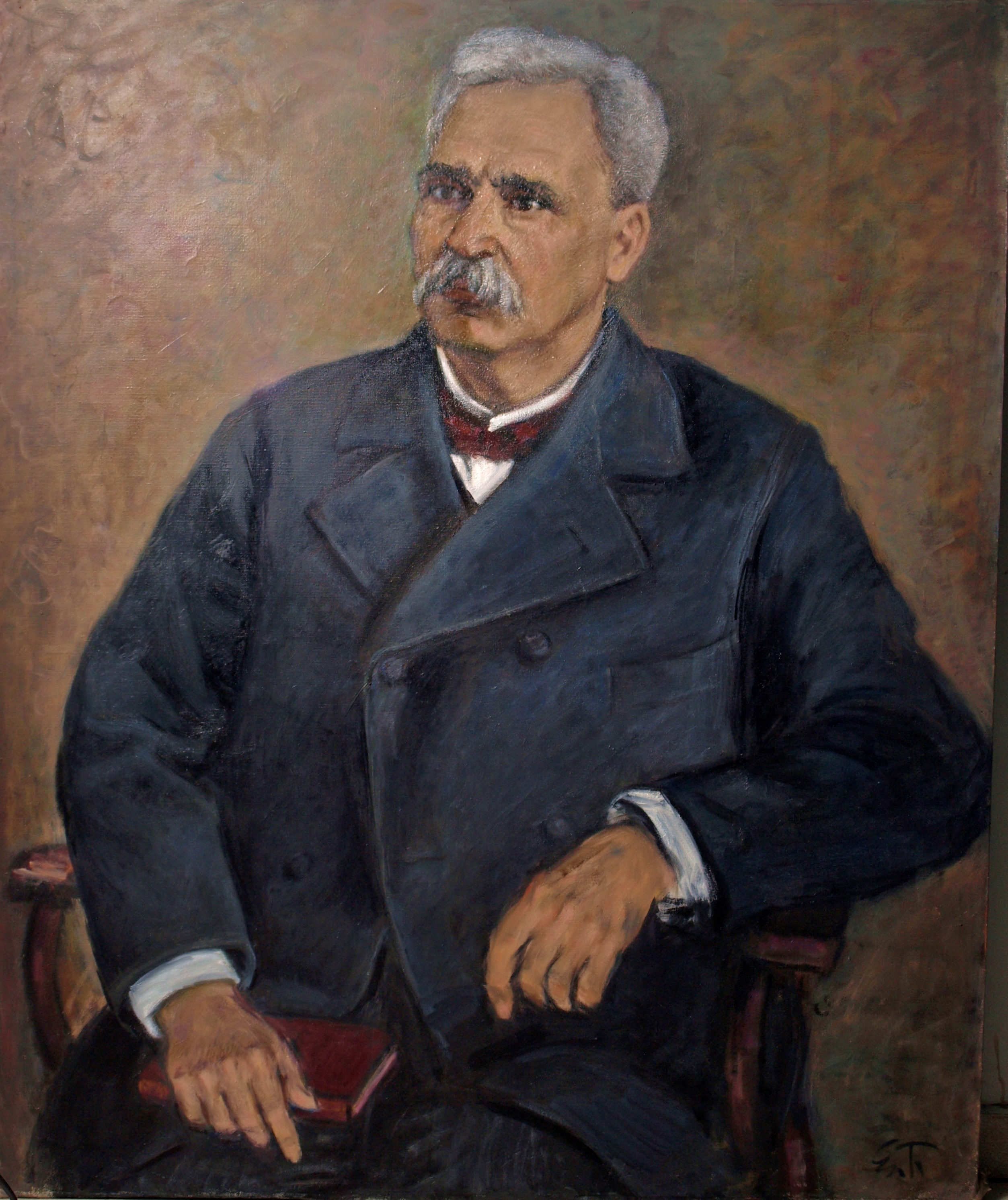 Портрет на Петко Славейков